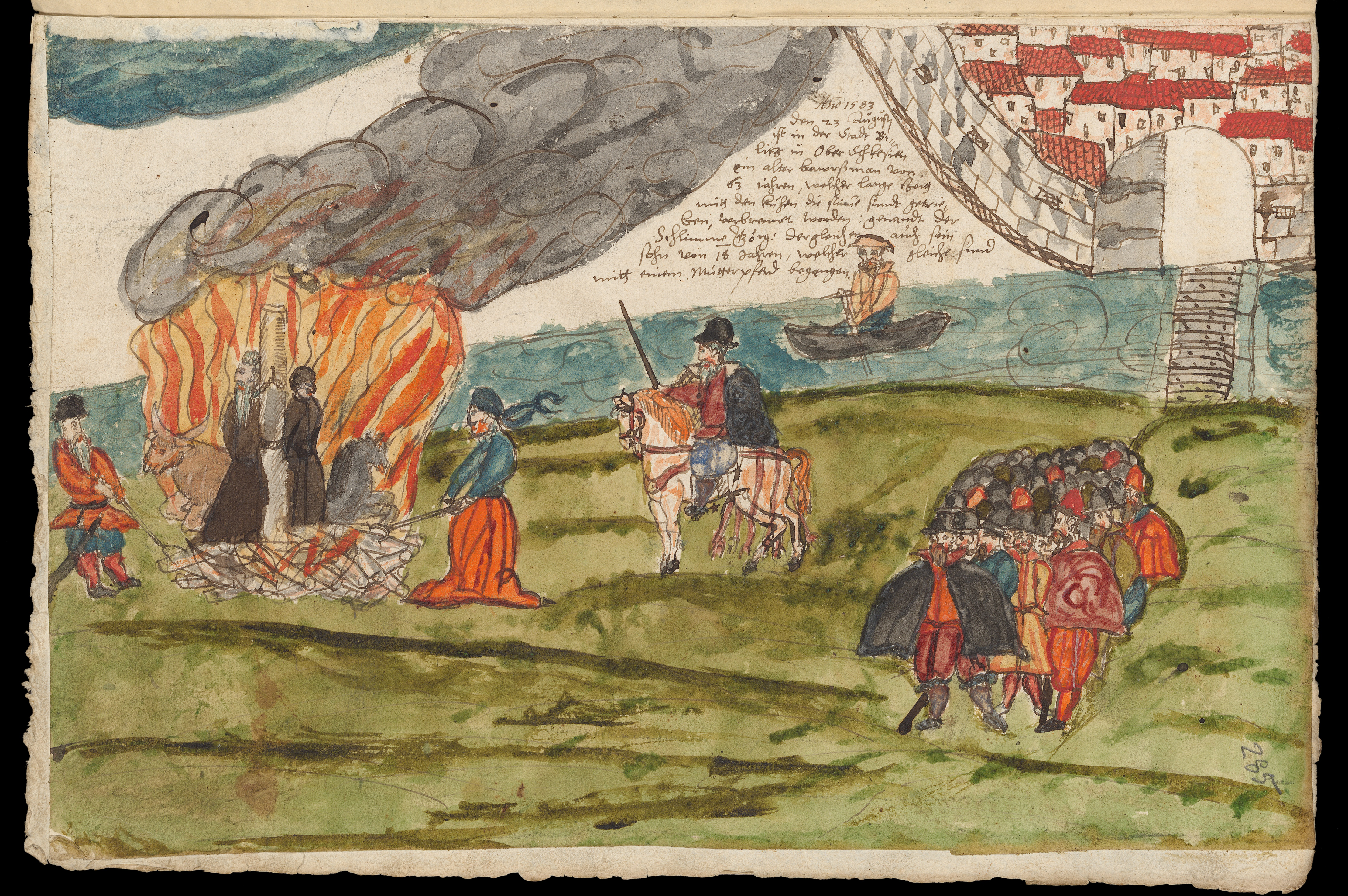 »In Bielitz wird am 23. Dezember 1583 ein Bauer und dessen Sohn wegen Sodomie verbrannt« aus Johann Jakob Wick: Sammlung von Nachrichten zur Zeitgeschichte aus den Jahren 1560-87 (mit älteren Stücken), Handschrift [1]